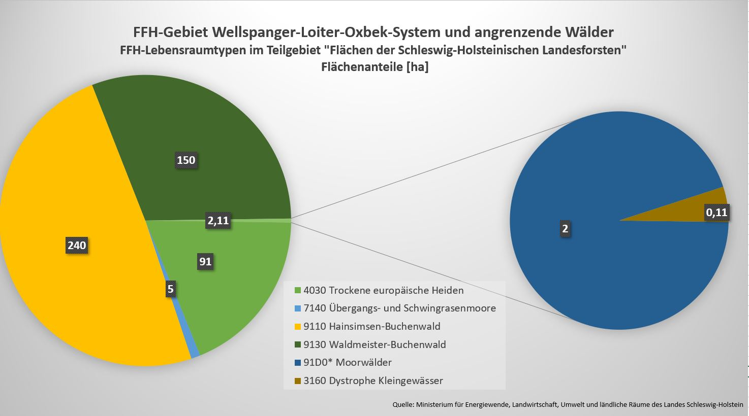 Selbst erstellte Grafik zu den Flächen der Lebensraumtypen (LRT) der Schleswig-Holsteinischen Landesforsten im FFH-Gebiet Wellspanger-Loiter-Oxbek-System und angrenzende Wälder